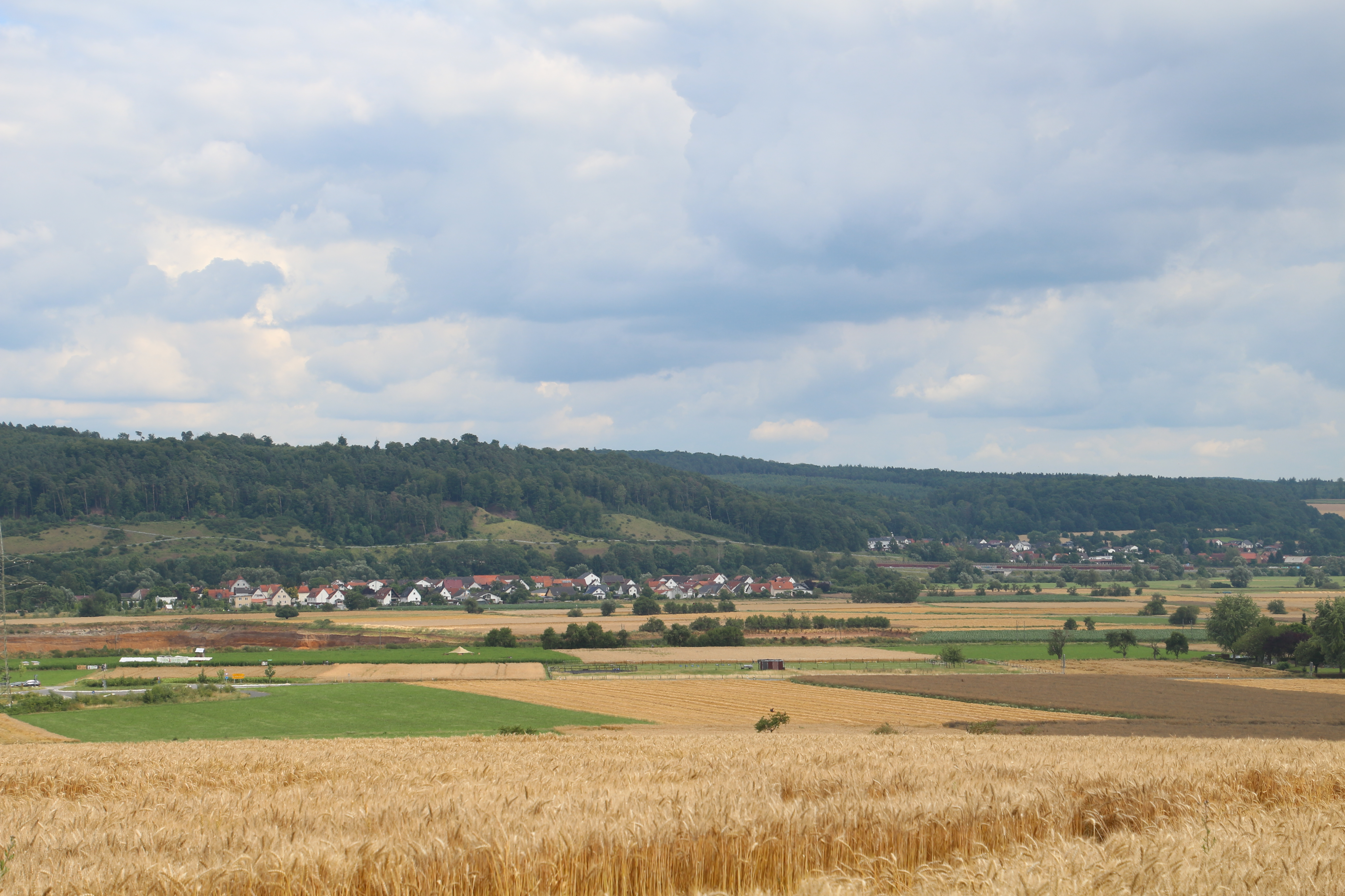 Siehe Bild und Dateiname